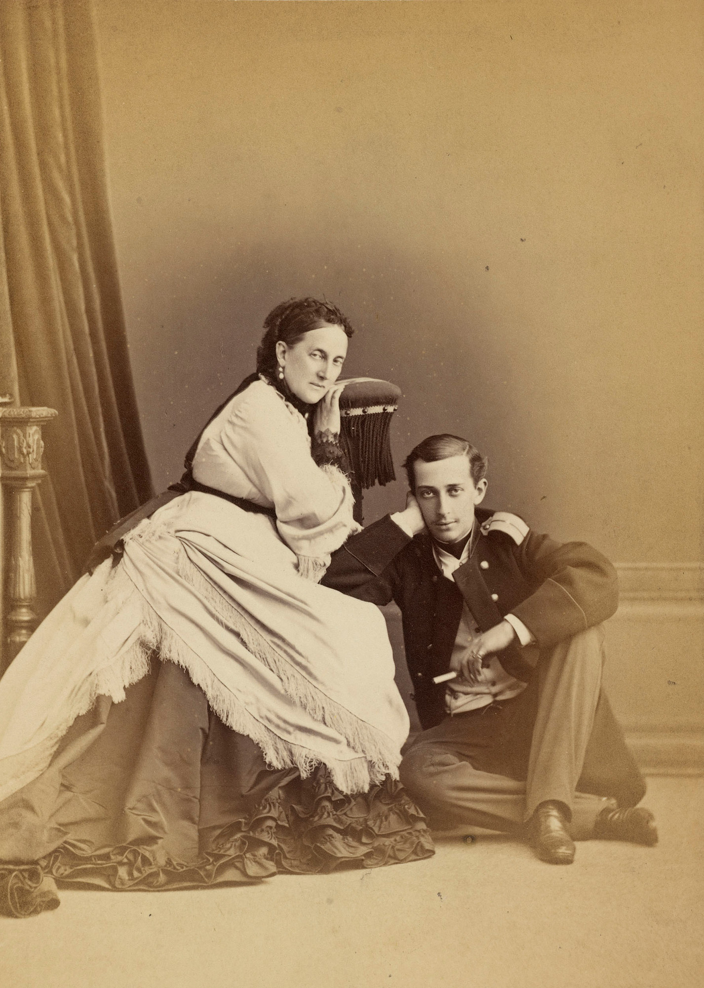 Grand Duchess Maria Nikolaevna and Prince Sergei of Leuchtenberg